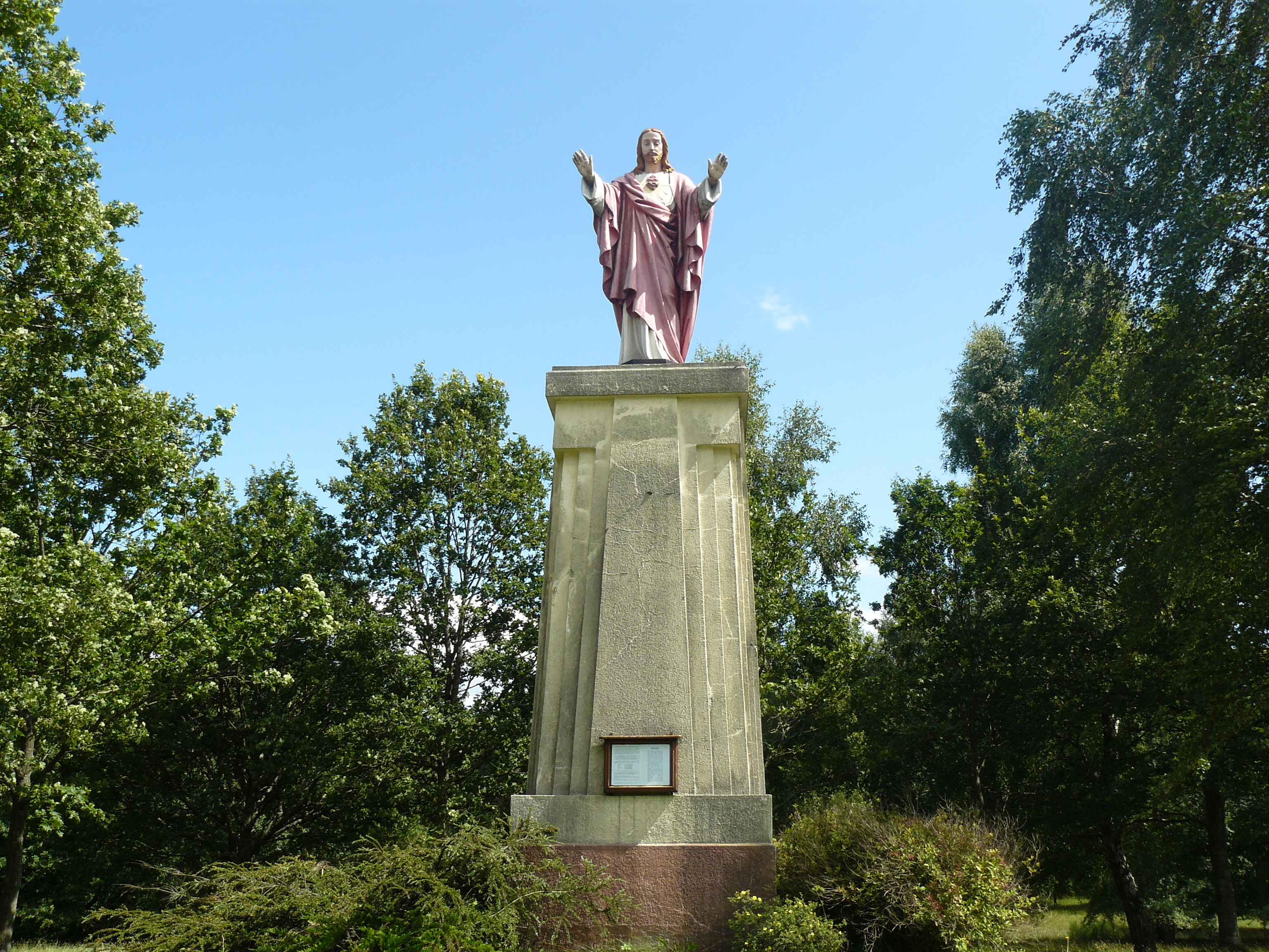 Statue du Sacré Cœur située sur la colline de "la Hossière"